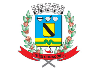 Brasão oficial do município mineiro de Três Corações